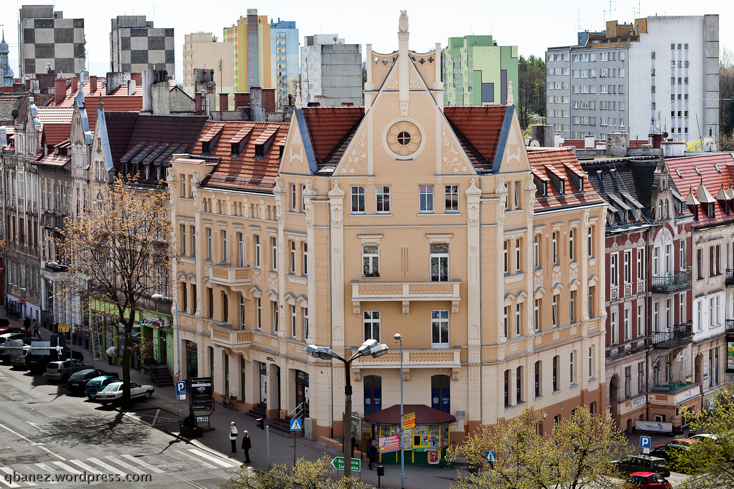 Panorama centrum Zgorzelca z osiedlem na Konarskiego w tle